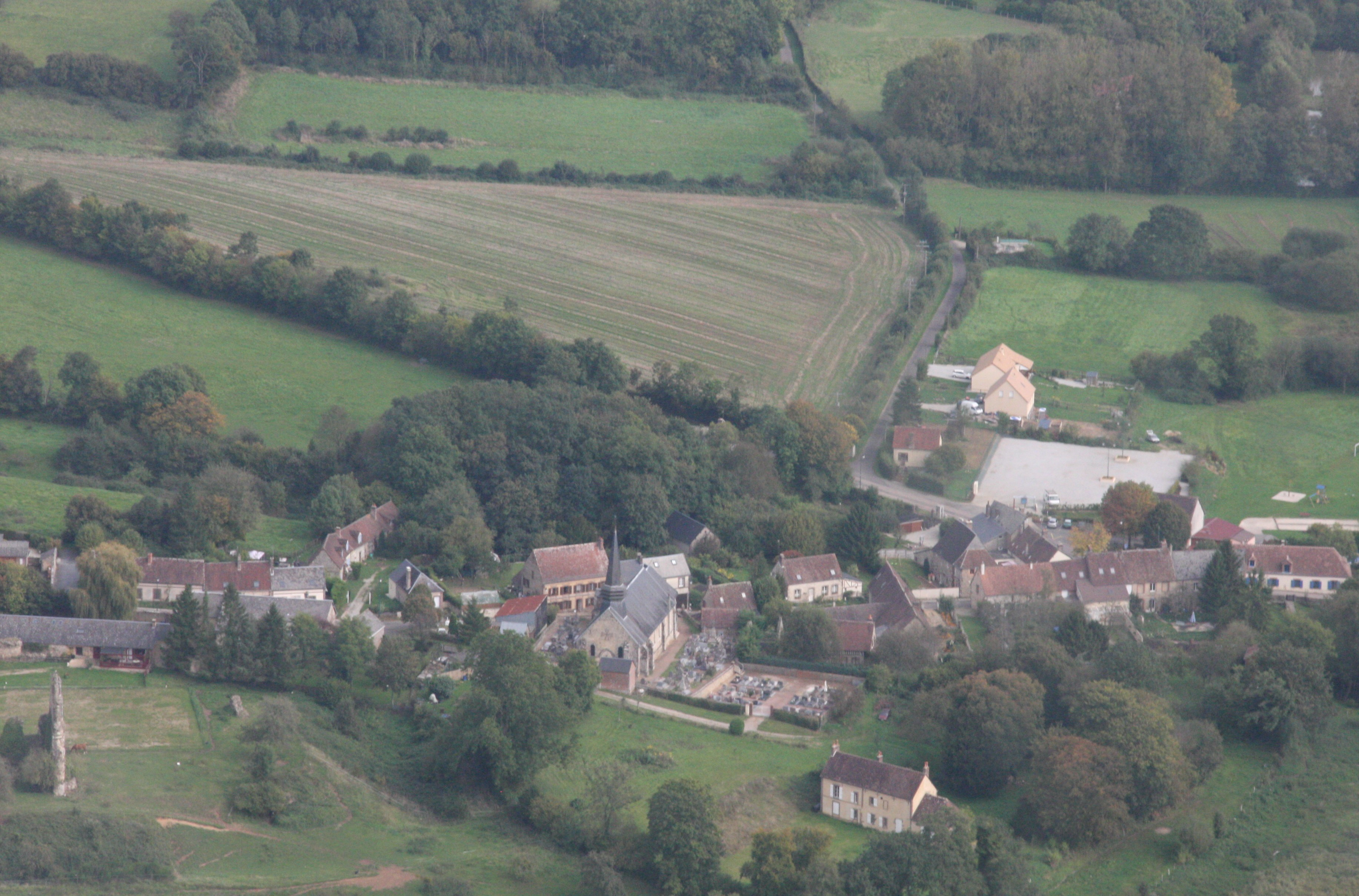 Le village de Bonsmoulins (Orne) vu d'avion le mercredi 1er octobre 2014